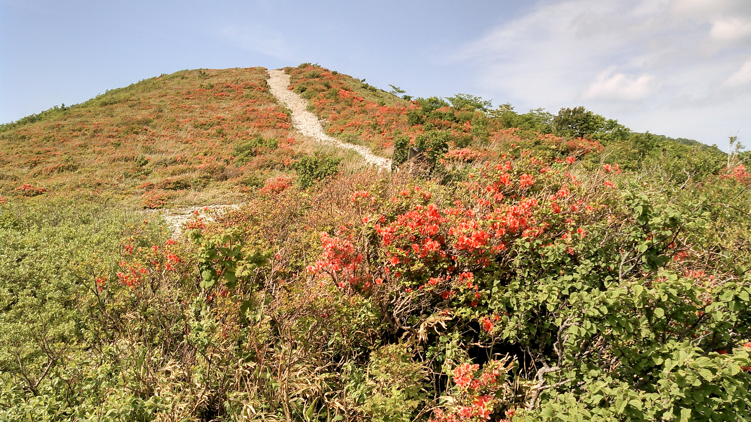 御霊櫃峠 付近に自生する山つつじ